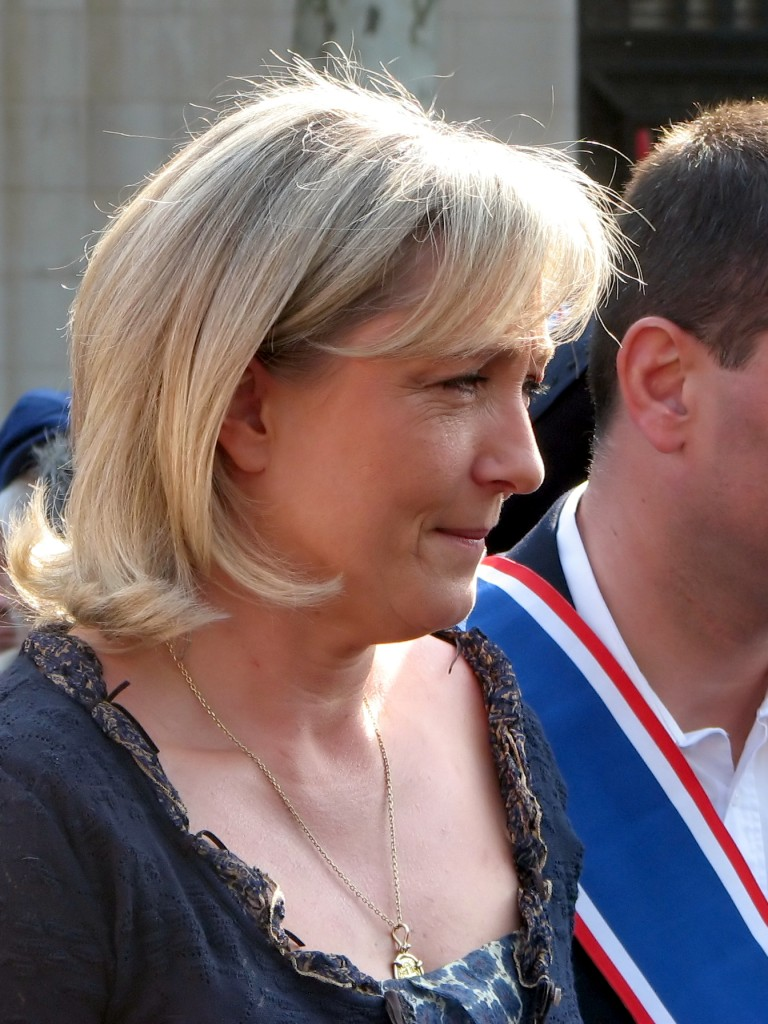 Marine Le Pen